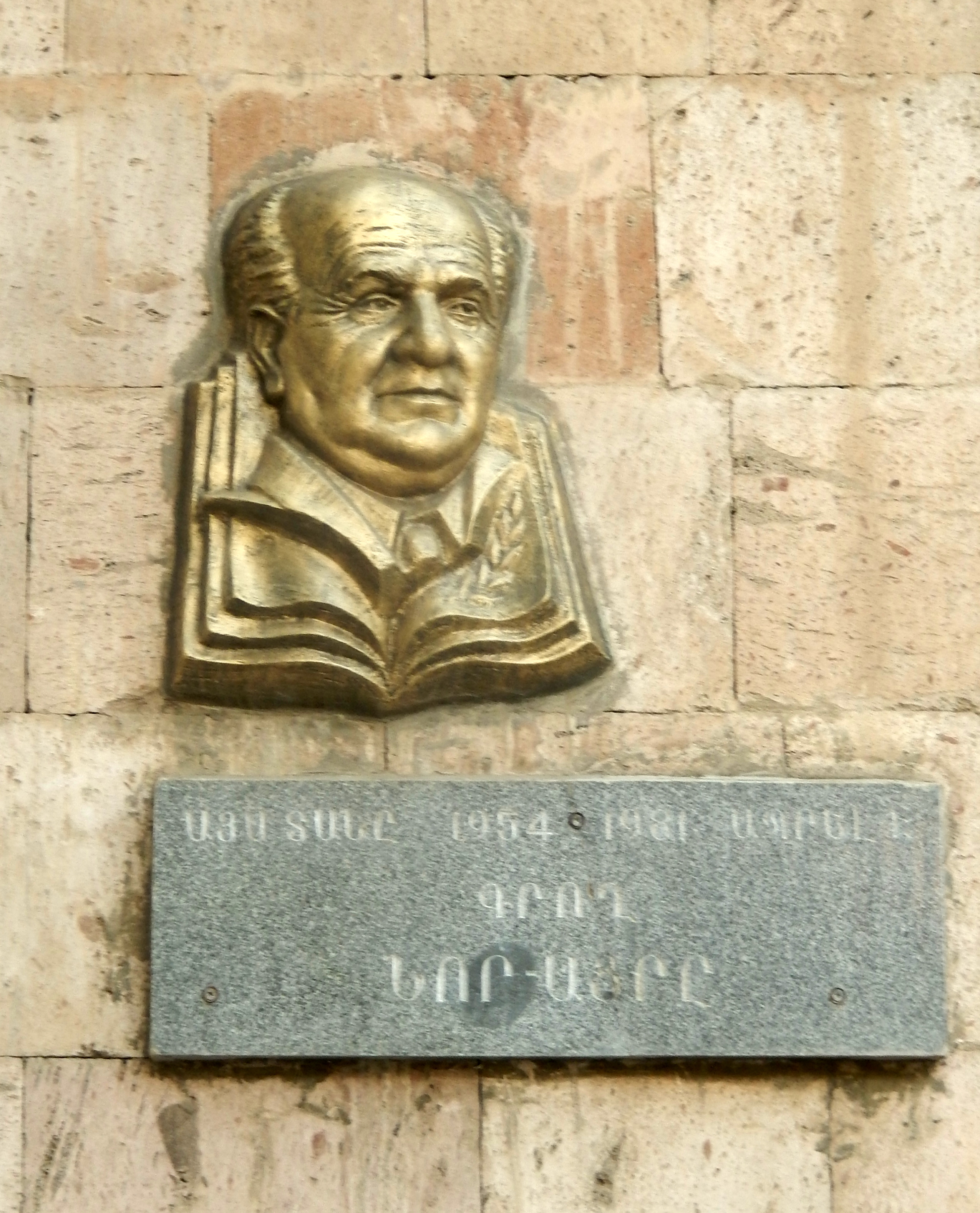 Plaque of Nor Ayr in Vanadzor, near Hayk Square 1/36